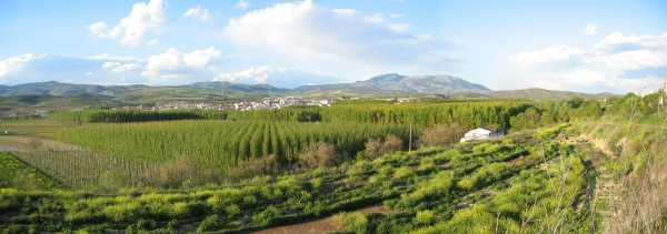 Villanueva Mesía, en la provincia de Granada (España)